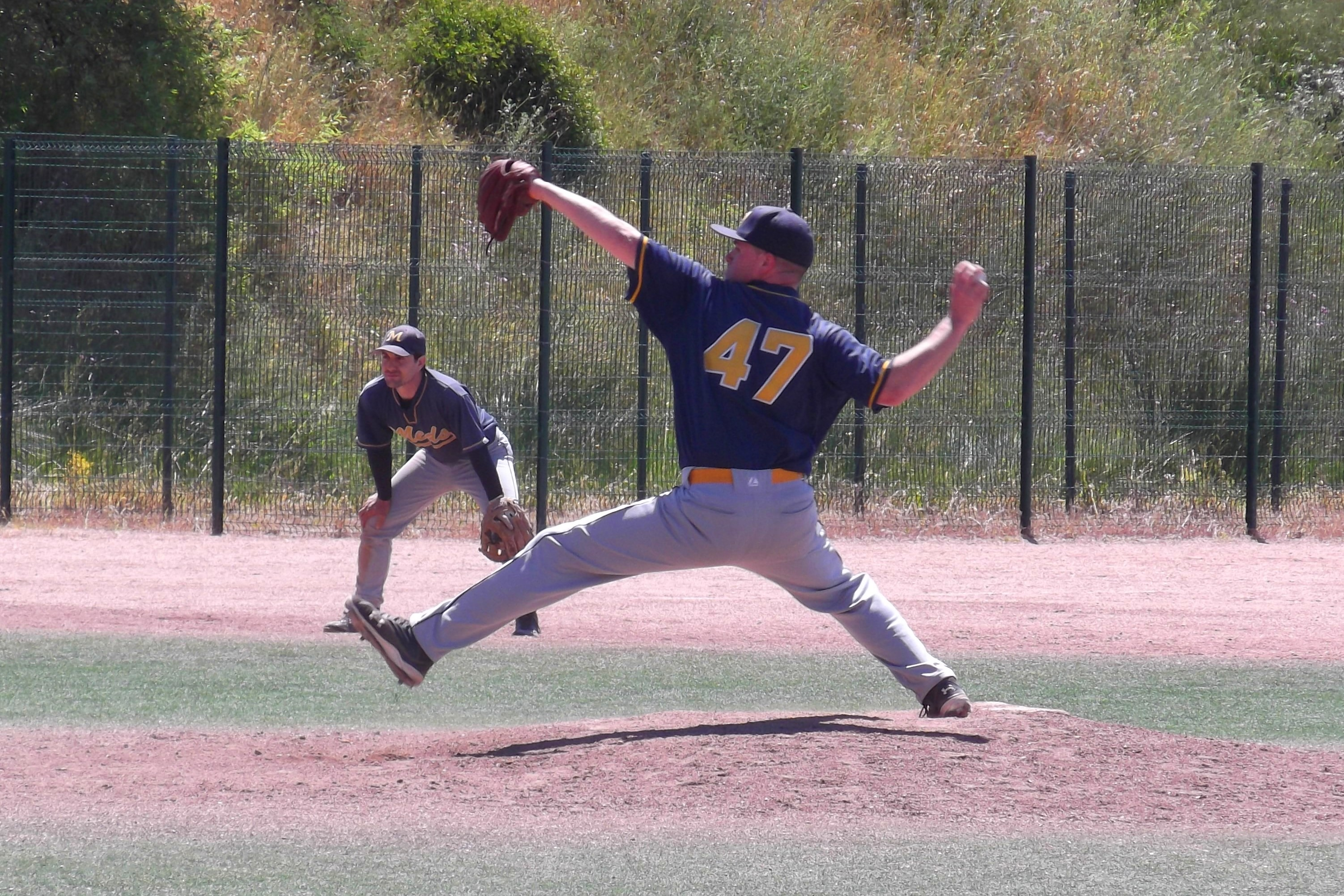 Baseball à Montpellier-Veyrassi, Barracudas Montpellier vs Cavigal Nice.